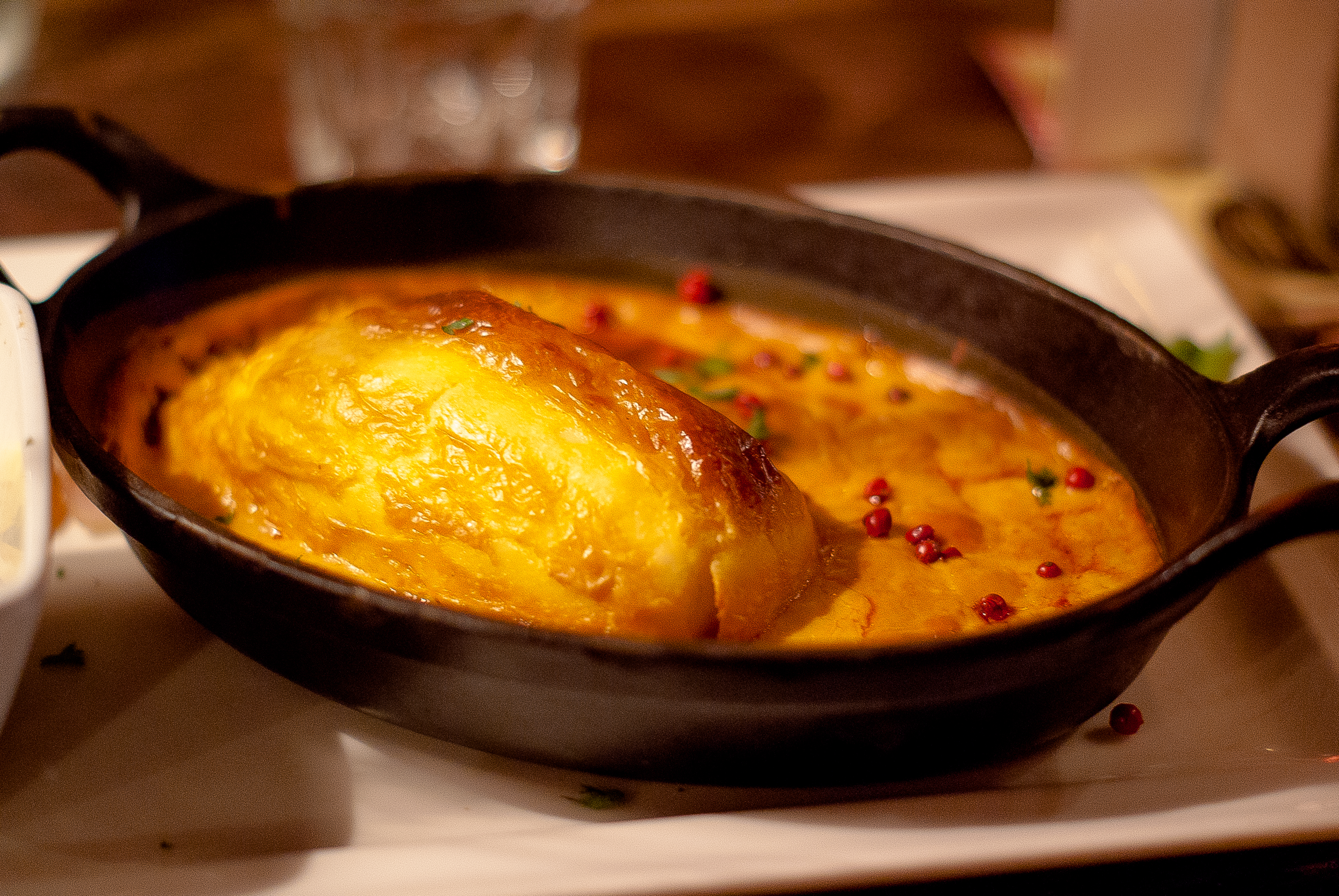 Quenelle de brochet sauce Nantua servie au "Restaurant A la Traboule" (3 Place du Gouvernement, 69005) dans le Vieux Lyon.